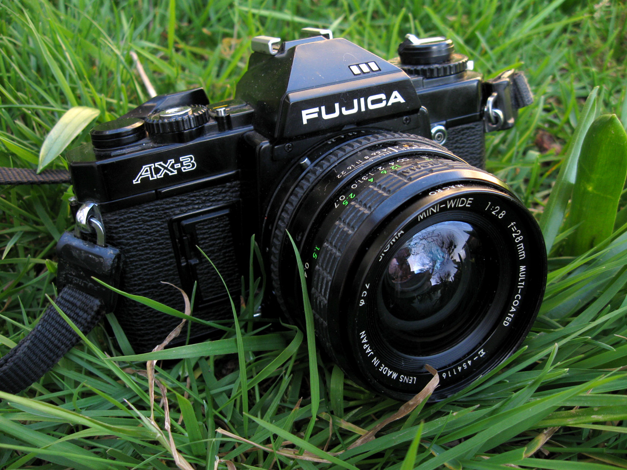 Fujica AX-3 + Sigma Mini-Wide 28mm f/2,8 SLR 35mm J'ai aussi trouvé la version "silver"!! ;-)